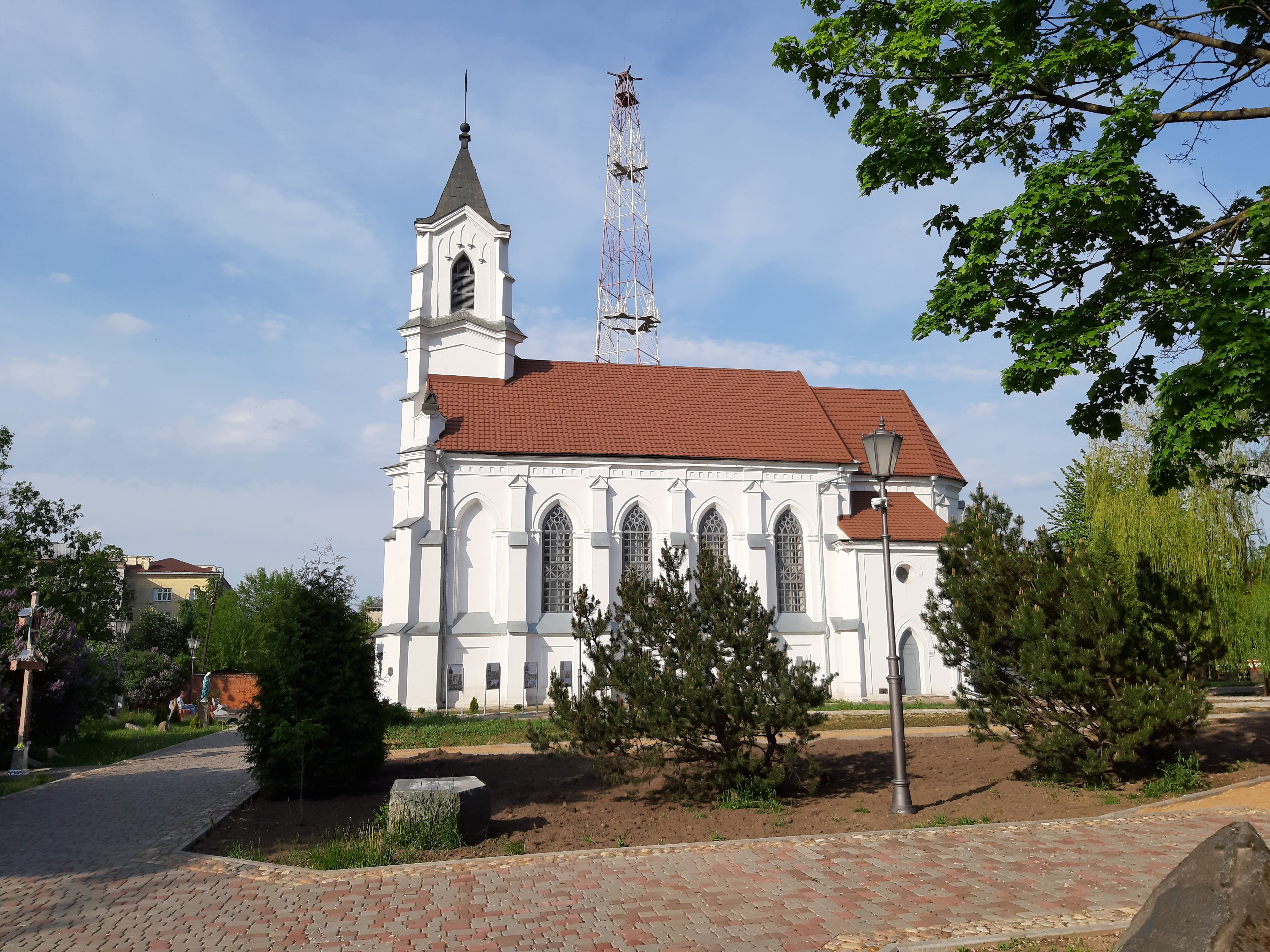 Касцёл Святога Роха. 2019